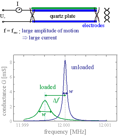 principle of a quartz crystal microbalance